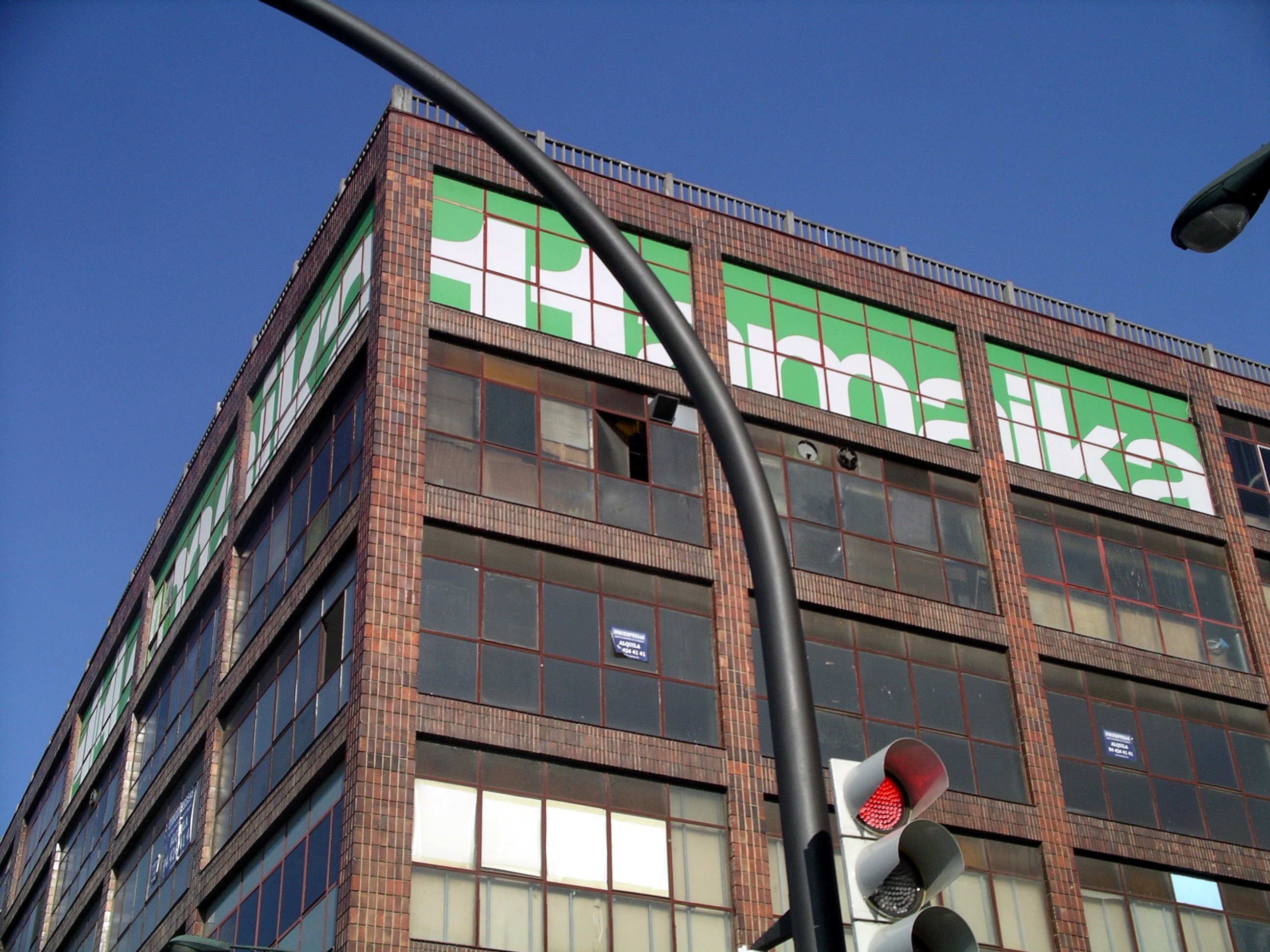 Hamaika Bilbo Telebistaren egoitza.